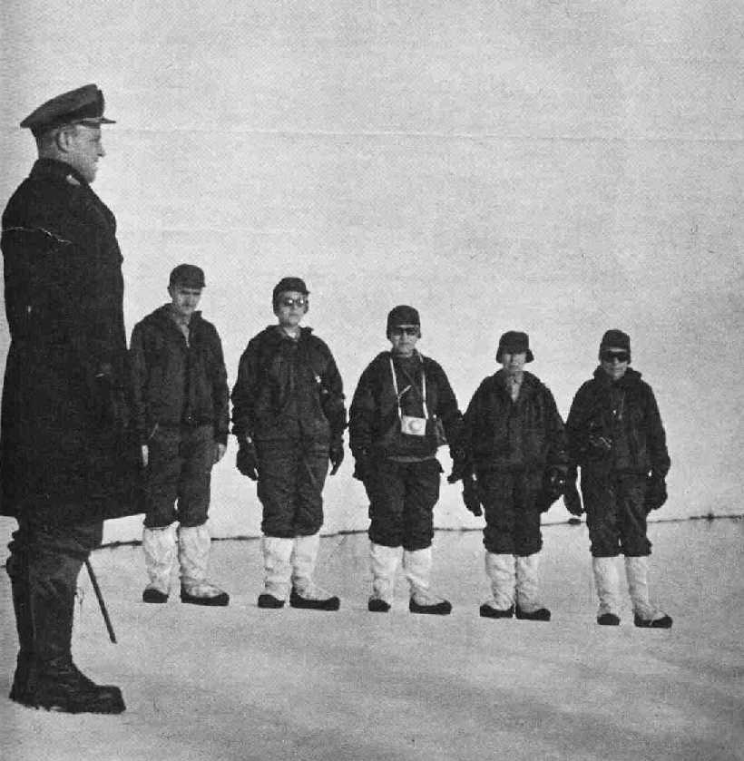 Irene Bernasconi (2da de derecha a izquierda). Viaje a Antartida 1968. Primeras investigadoras mujeres en Antartida Argentina.